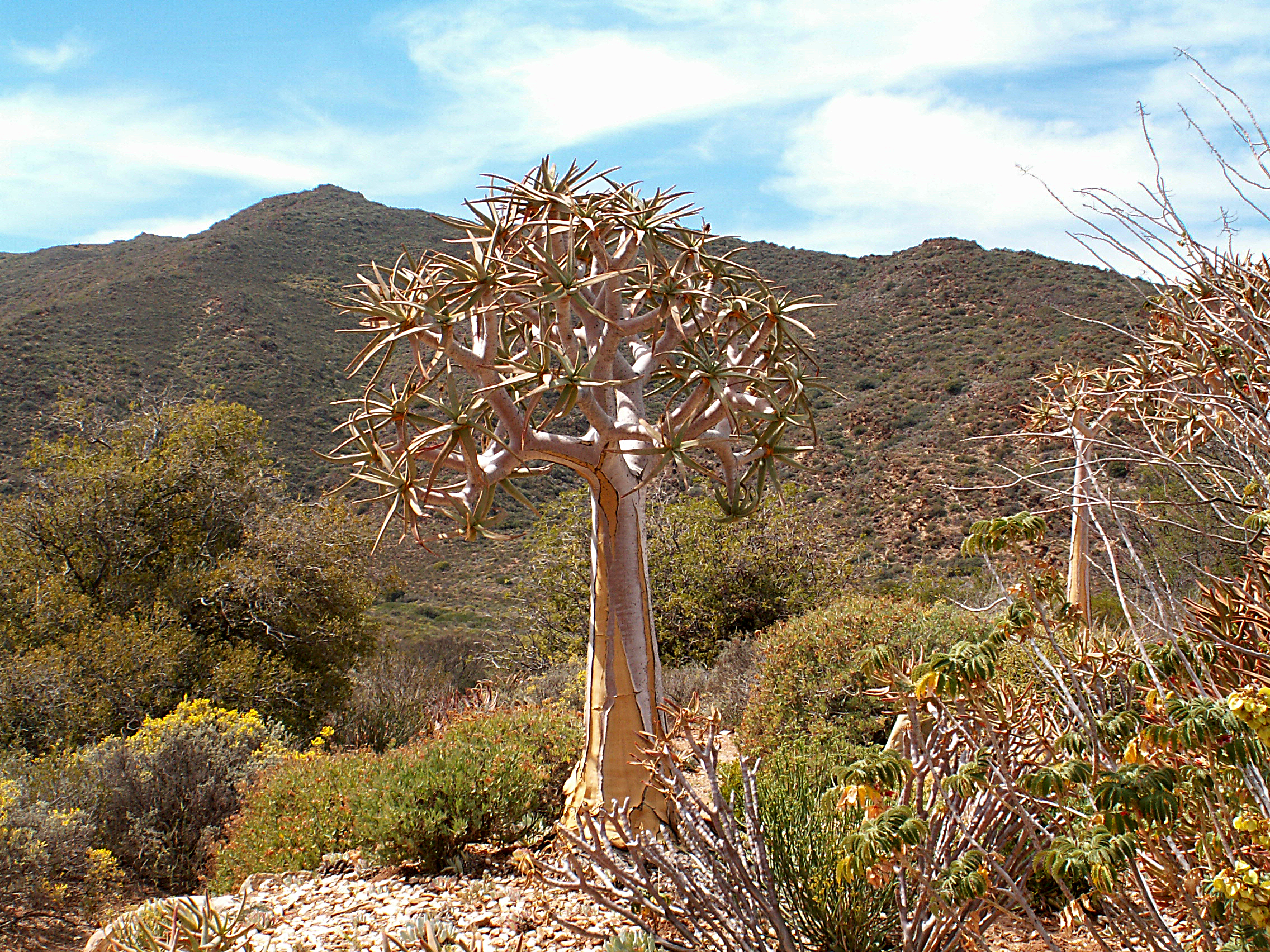 Der Karoo Desert National Botanical Garden im Westkap, Südafrika